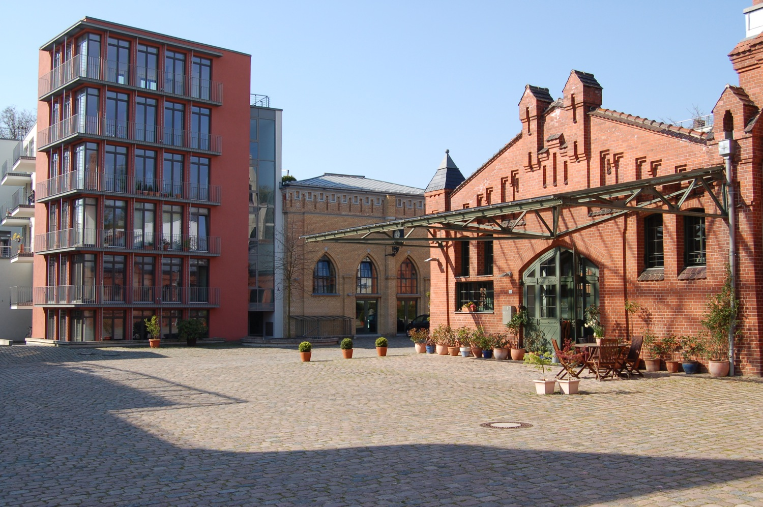 Viktoria-Quartier in Berlin-Friedrichshain